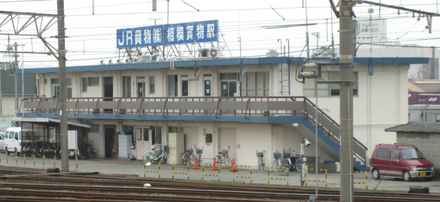 相模貨物駅の駅舎